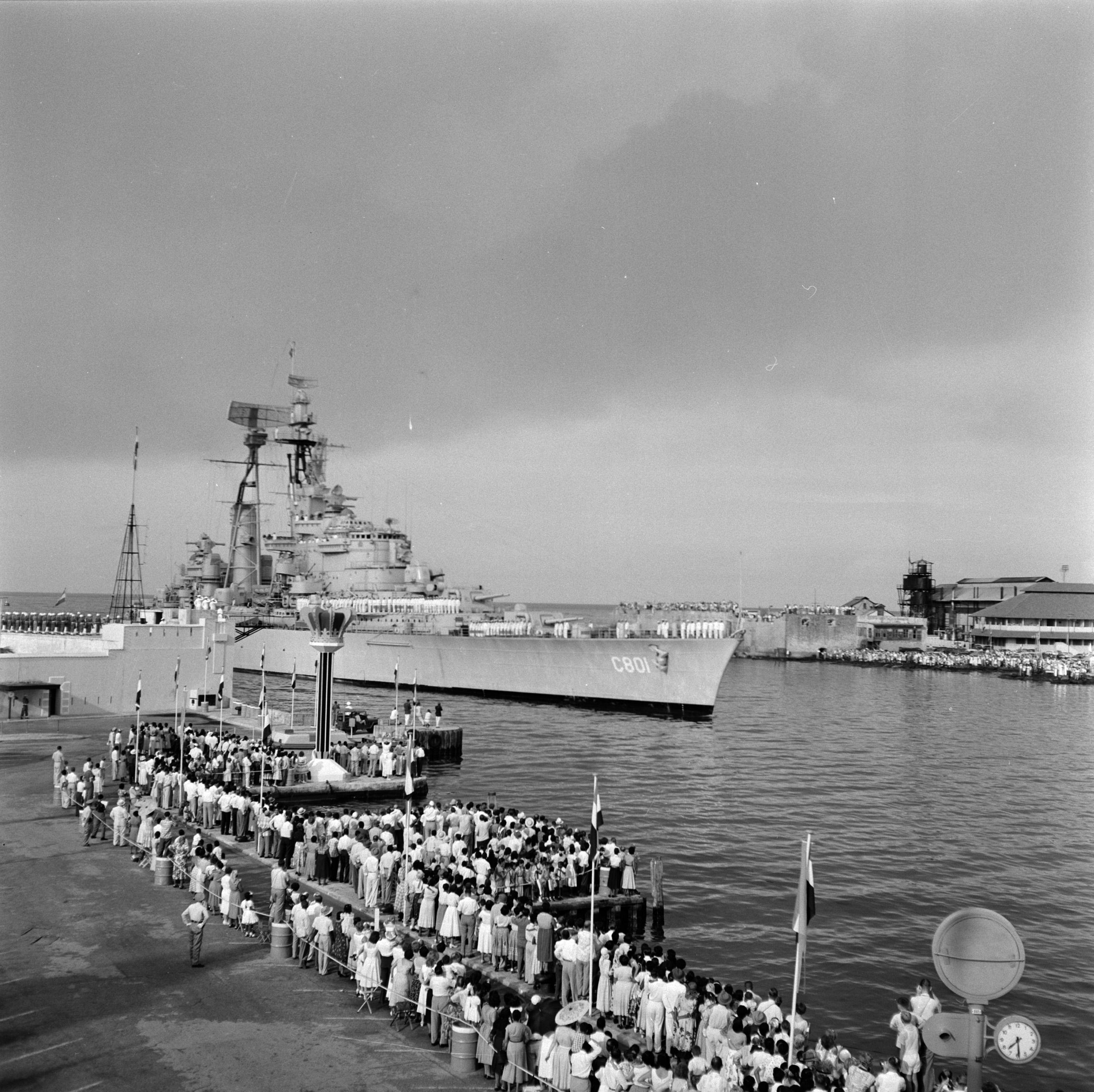 Collectie / Archief : Fotocollectie Van de Poll Reportage / Serie : Nederlandse Antillen en Suriname ten tijde van het koninklijk bezoek van koningin Juliana en prins Bernhard in 1955 Beschrijving : HM kruiser De Ruyter met het koninklijk paar aan boord vaart de St. Annabaai in Willemstad binnen Datum : 18 oktober 1955 Locatie : Curaçao, Nederlandse Antillen, Willemstad Trefwoorden : inheemse bevolking, koninklijke bezoeken, schepen Fotograaf : Poll, Willem van de Auteursrechthebbende : Nationaal Archief Materiaalsoort : Negatief (zwart/wit) Nummer archiefinventaris : bekijk toegang 2.24.14.02 Bestanddeelnummer : 252-3554